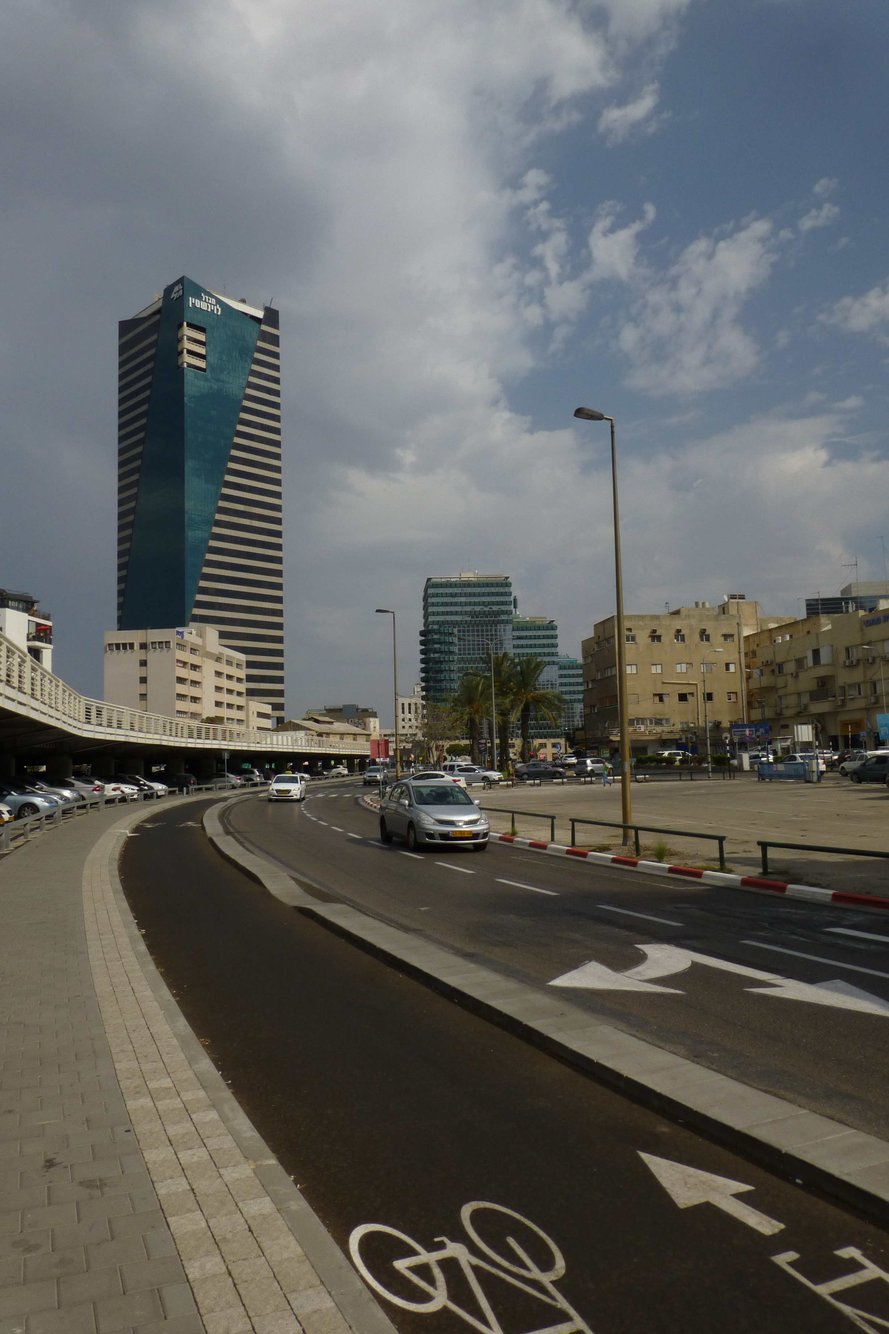 בית הדר הוא בניין המשרדים הראשון שנבנה בתל אביב. הבניין תוכנן ב-1934 על ידי האדריכל קרל רובין והוקם בין השנים 1936 ו-1938. מבנה זה הוא גם הבניין הראשון שנבנה כשלד פלדה, סוג בנייה נדיר יחסית בארץ.